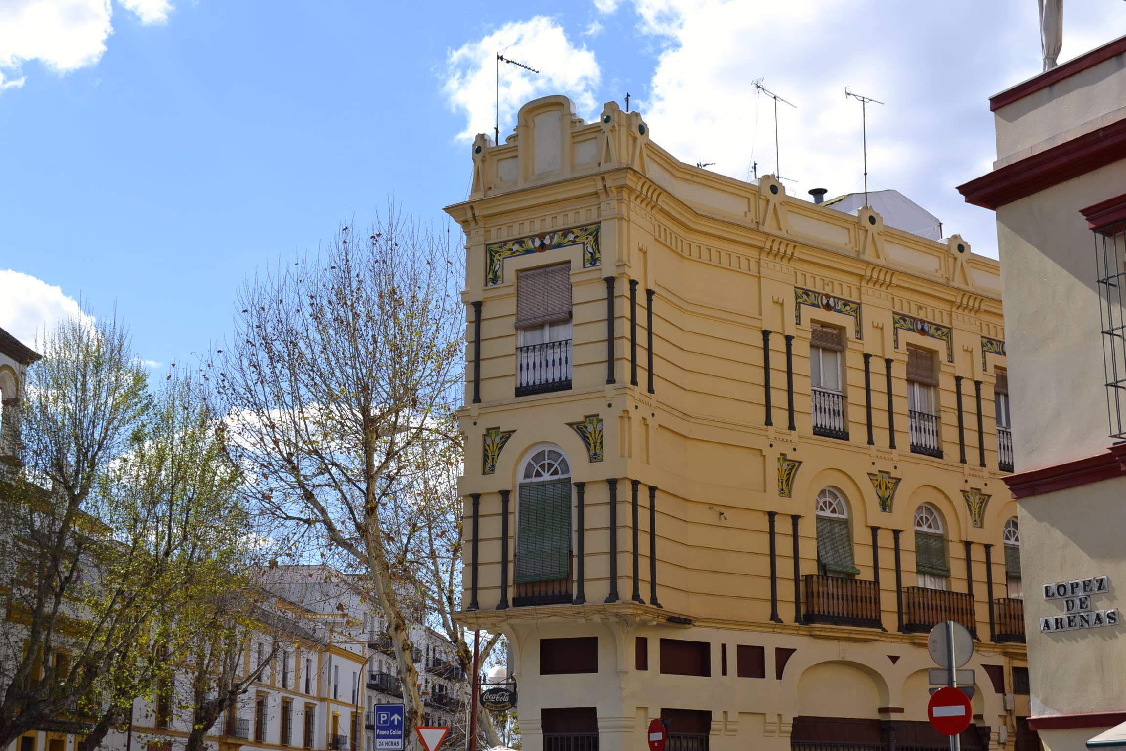 Edificio singular en el barrio de El Arenal. Sevilla, marzo de 2012